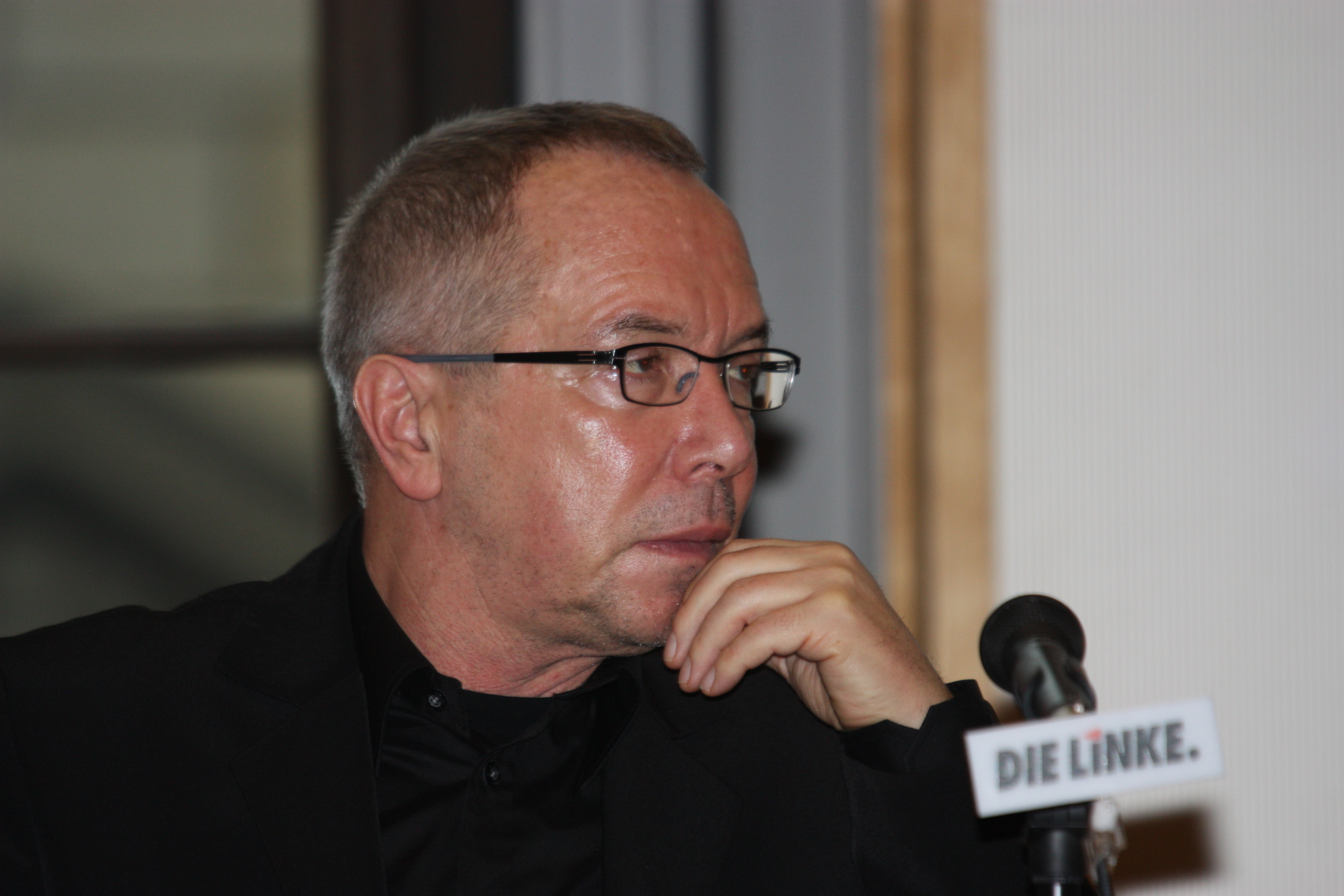 Wolfgang Nešković - German politician (Die Linke)